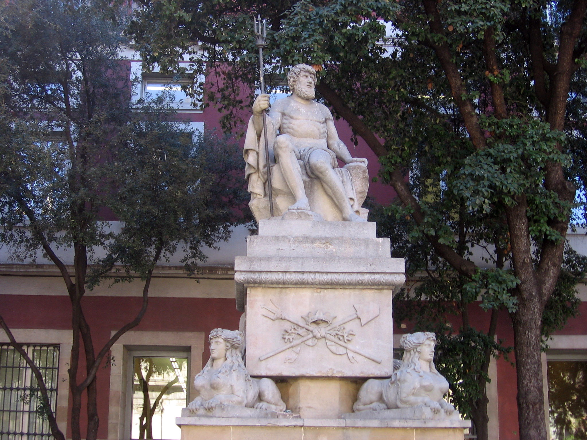 Fuente de Neptuno, de Adrià Ferran, 1826, Plaza de la Mercè, Barcelona.